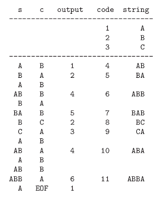 exemple codi ziv - lempel